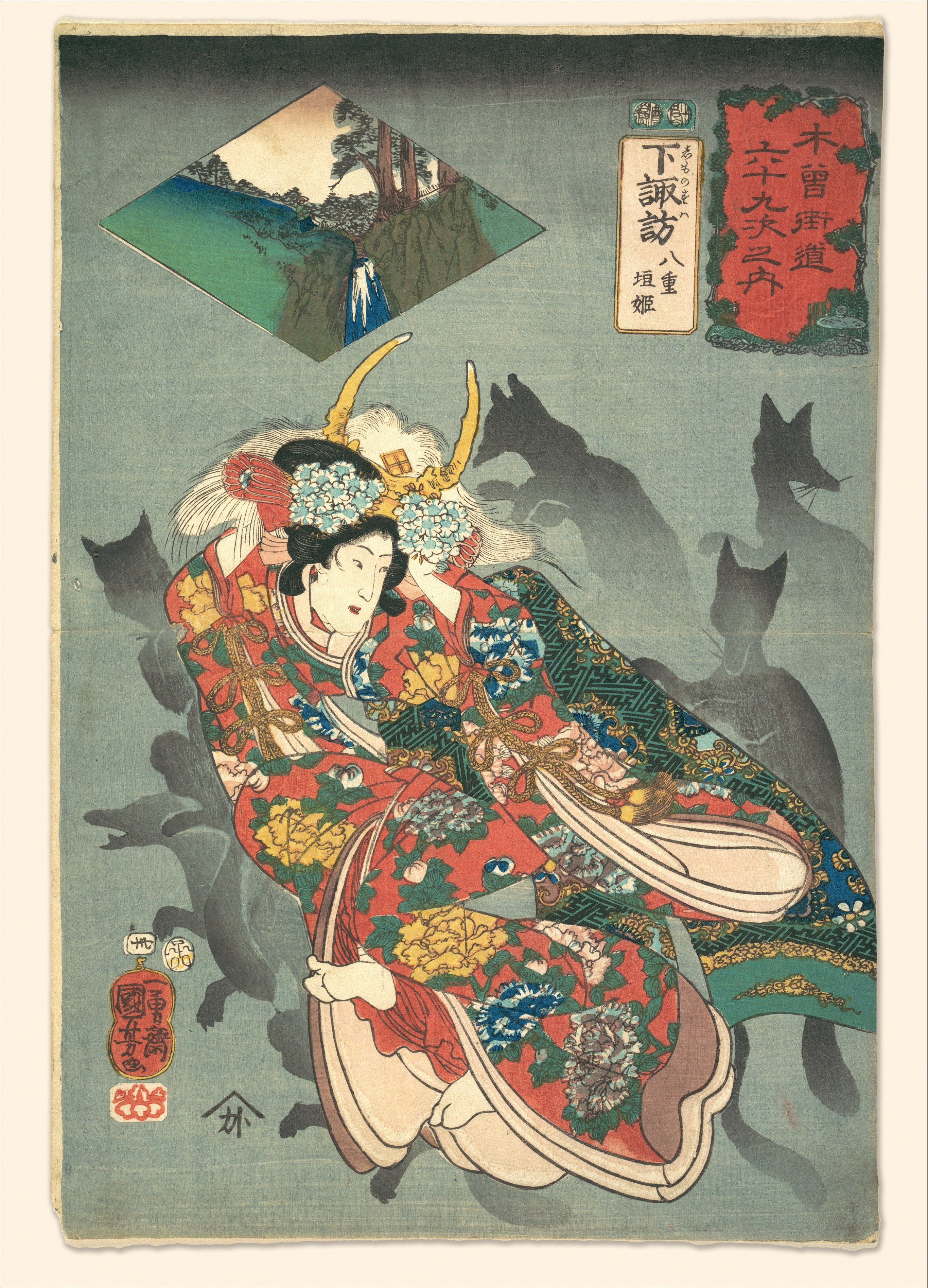 Japan; Print; Prints